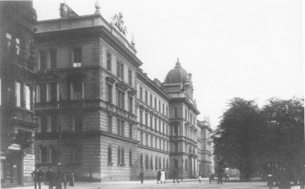 Pohlednice zobrazuje Štefánikova kasárna (Smíchovská kasárna) na Náměstí Kinských v Praze 5 na Smíchově ve dvacátých letech dvacátého století. Komplex byl postaven v letech 1892 až 1902 na místě zbouraného hostince Eggenberk, v jehož sále byla založena a působila smíchovská jednota Sokola, a na místě divadelní arény, kterou postavil Pavel Švanda ze Semčic. Za protektorátu Němci přejmenovali kasárna na Albrechtova, po druhé světové válce (až do začátku 90. let dvacátého století) se kasárna jmenovala Fučíkova. Dnes (2016) se zde nachází Justiční palác.